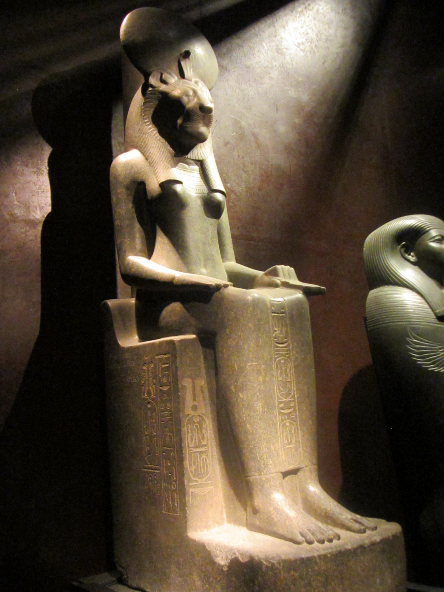 Statua divinità (Sekhmet) - Museo Egizio di Torino - ( Parte 2 del Museo)